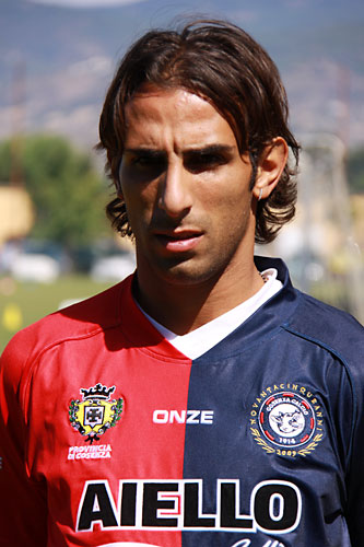 Valerio Virga